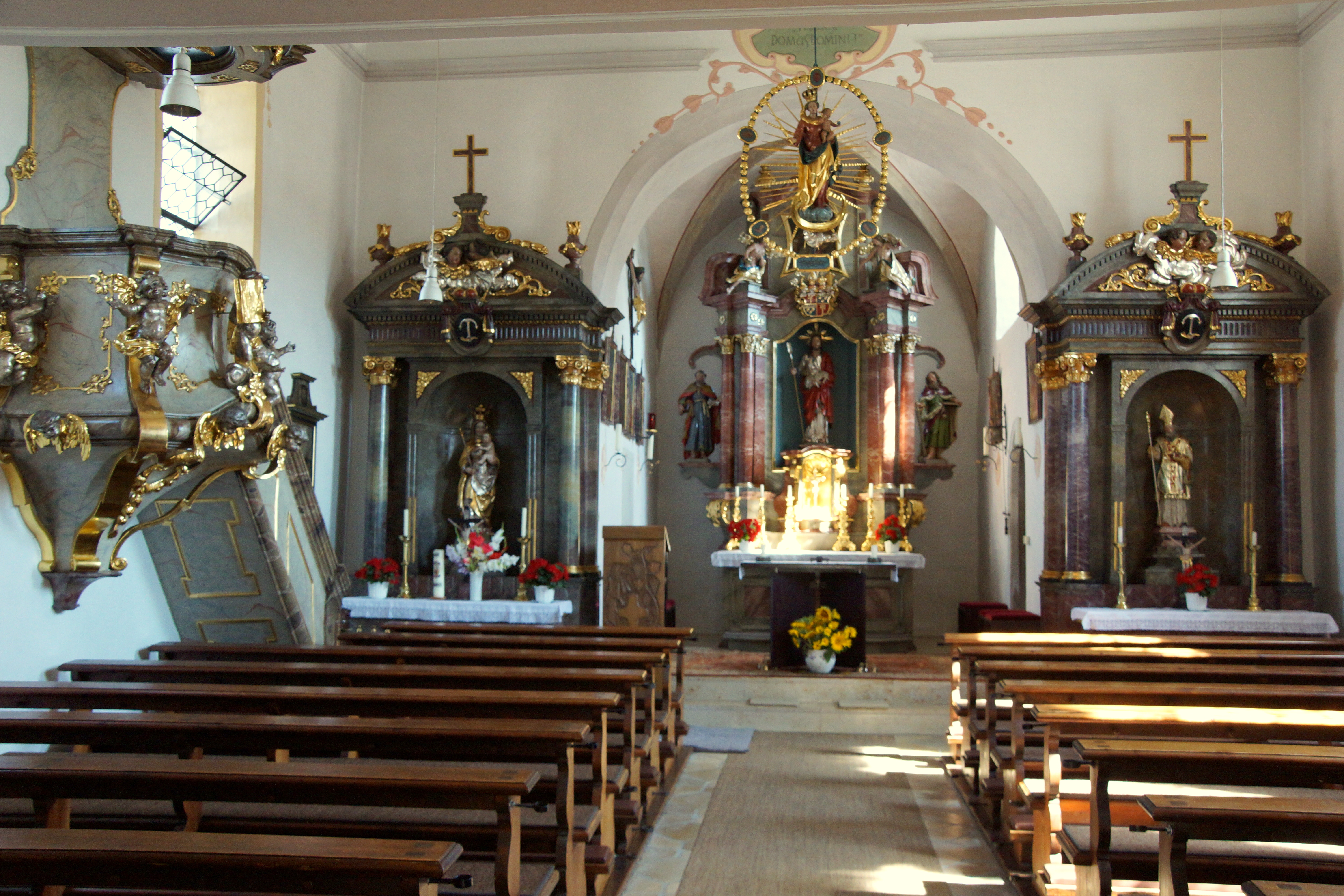 Die katholische Pfarrkirche St. Nikolaus in Pfünz